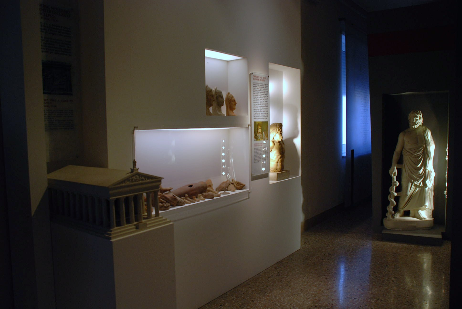 Un angolo del primo piano del museo